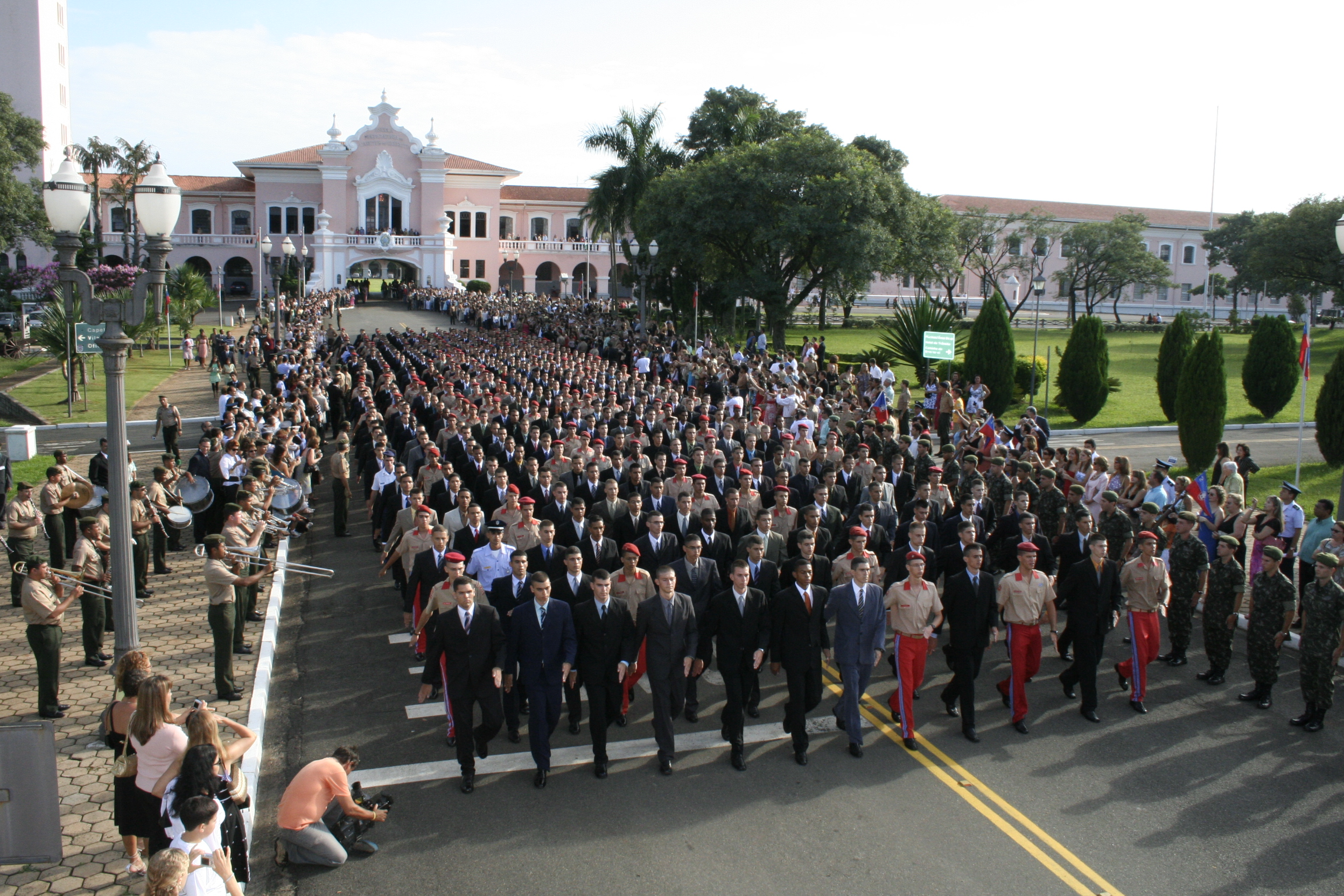 foto da solenidade de entrada nos portoes da espcex